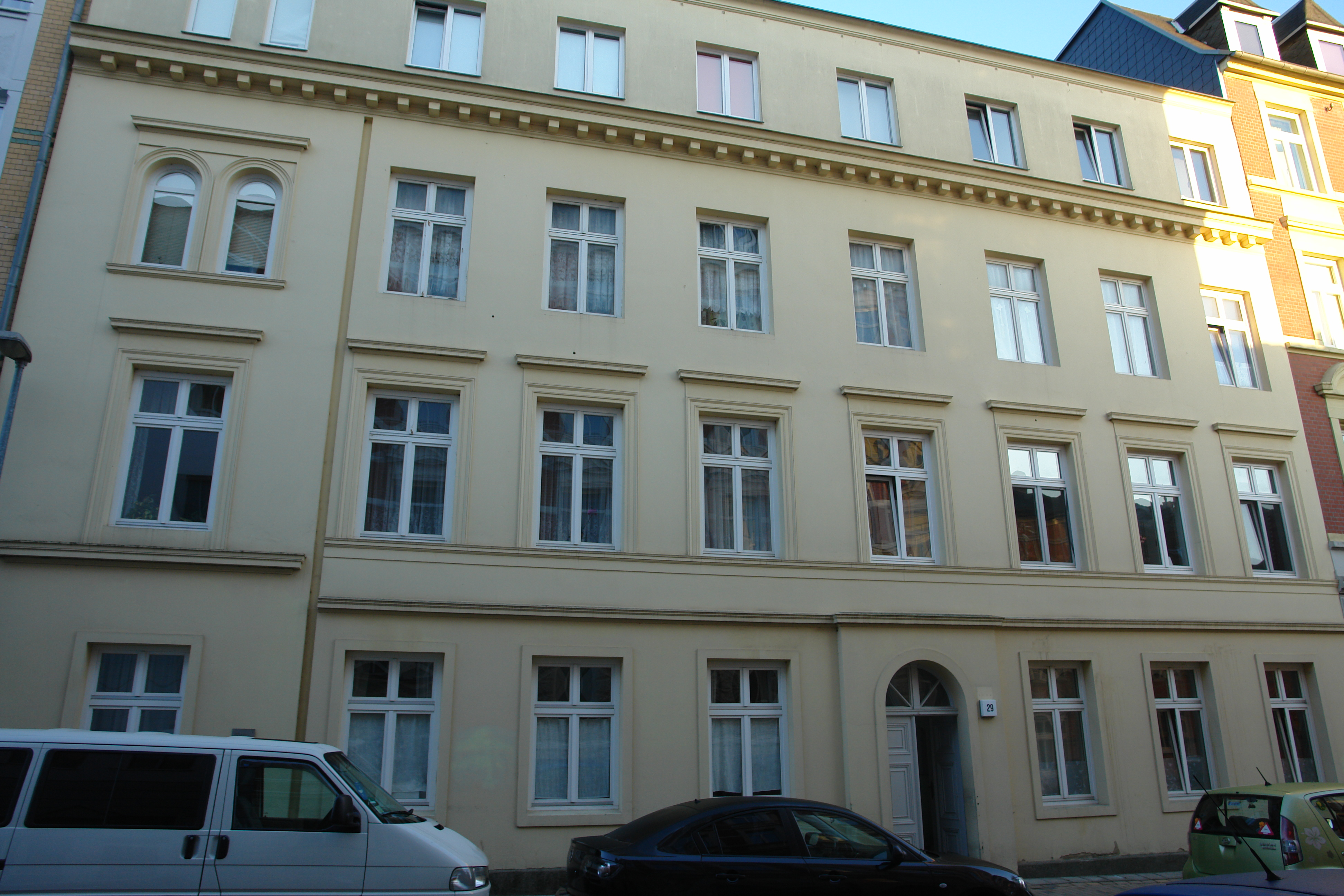 Gebäude Bergstraße 29/Landreiterstraße 3a, hier das Hausteil Bergstraße 29; Schwerin, Ortsteil Schelfstadt. Aufgenommen von der gegenüberliegenden Straßenseite.